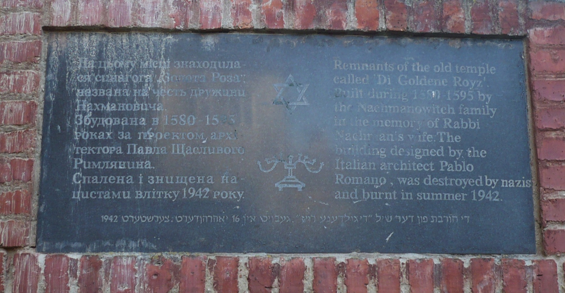 Lwów. Synagoga Złota Roża